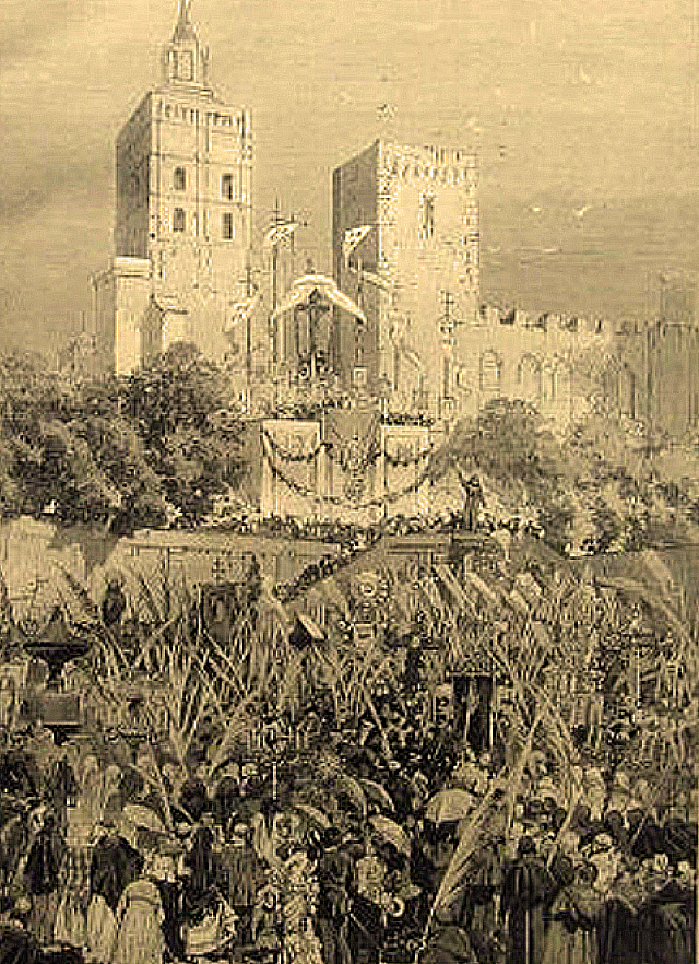 Procession des Pénitents gris de la rue des Teinturiers à ND des Doms en 1876